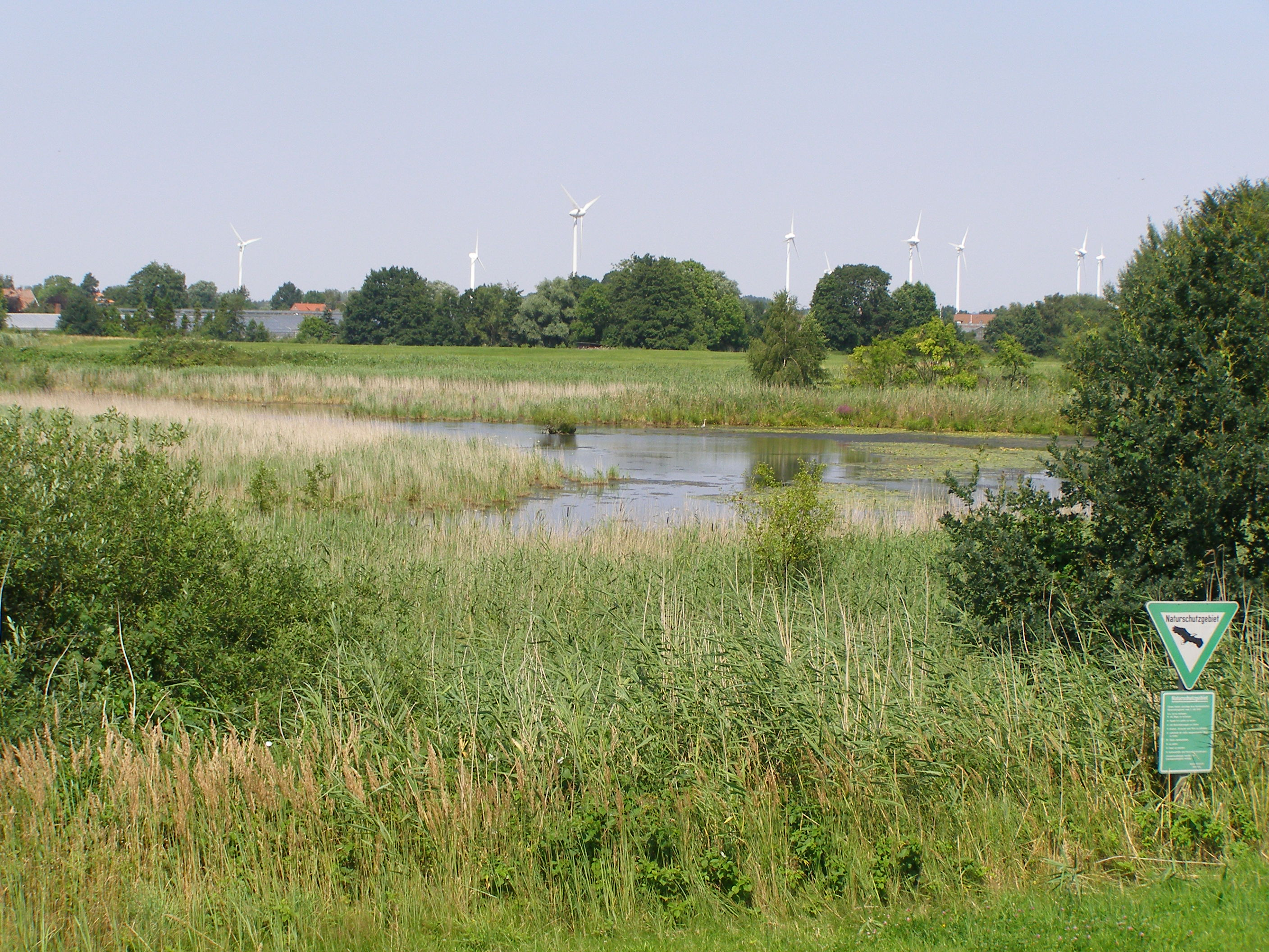 Das Deichbrack (südöstlicher Ausläufer des Kiebitzbracks), vom Kraueler Hauptdeich aus gesehen